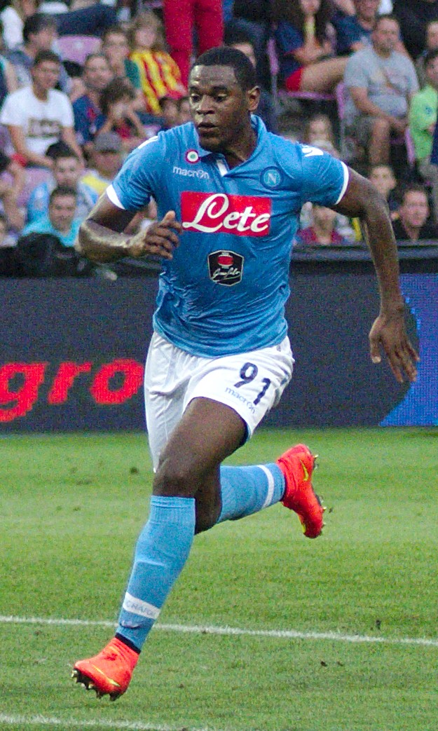 Barça - Napoli - 20140806